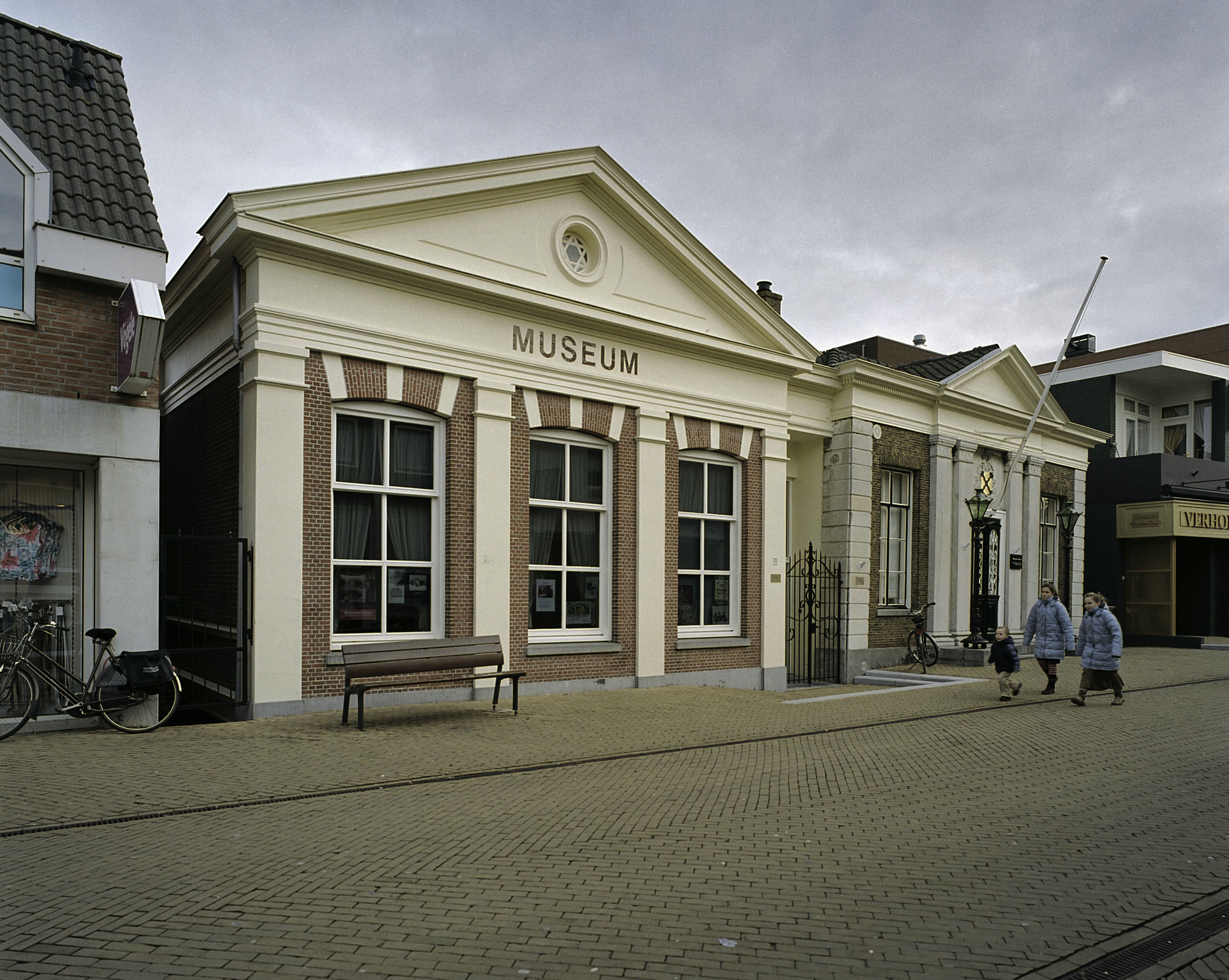 VOORMALIG STADHUIS: Voorgevel met driehoekig fronton (opmerking: Gefotografeerd voor Monumenten In Nederland Zuid-Holland)